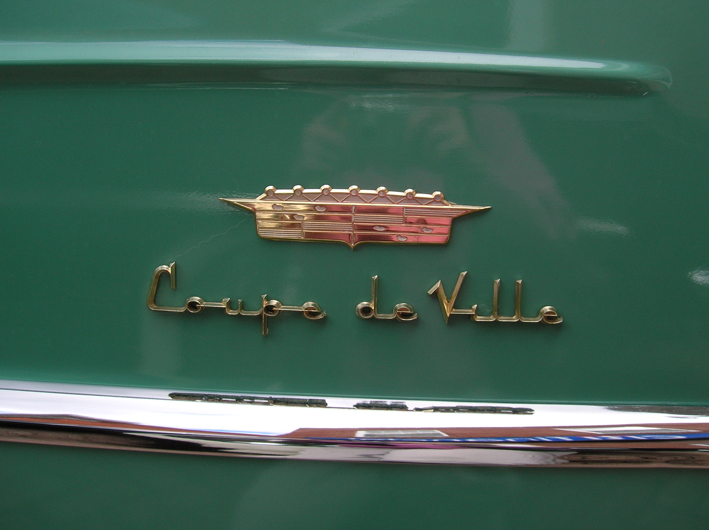 1956 Cadillac Coupe de Ville badge